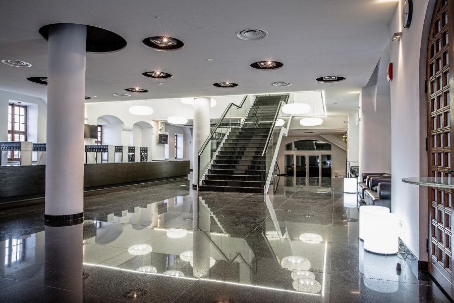 Foyer Opery na Zamku w Szczecinie